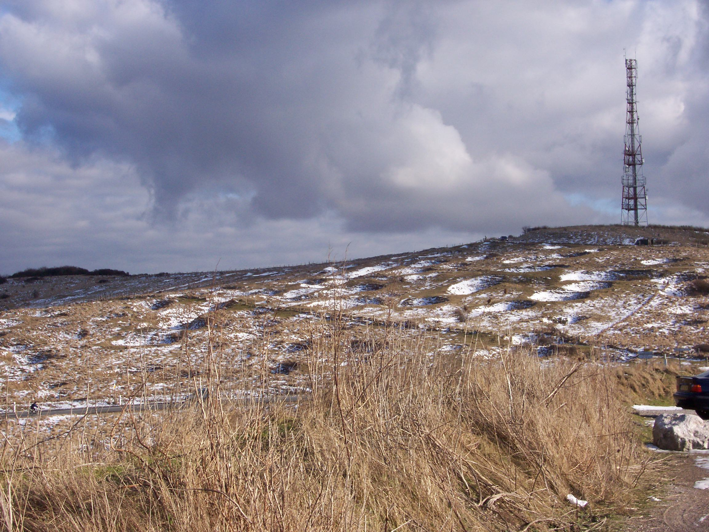 Trous créés par les bombardements durant la 2nde guerre mondiale toujours visible depuis le Cap Blanc-Nez, Pas de Calais, France.